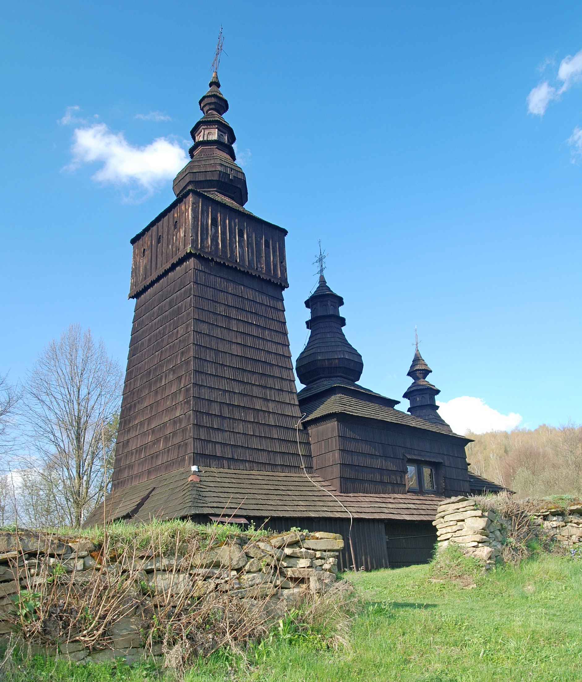 wieś Potoky